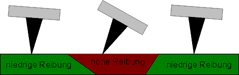 Schema der Reibungskraftmessung mit dem AFM